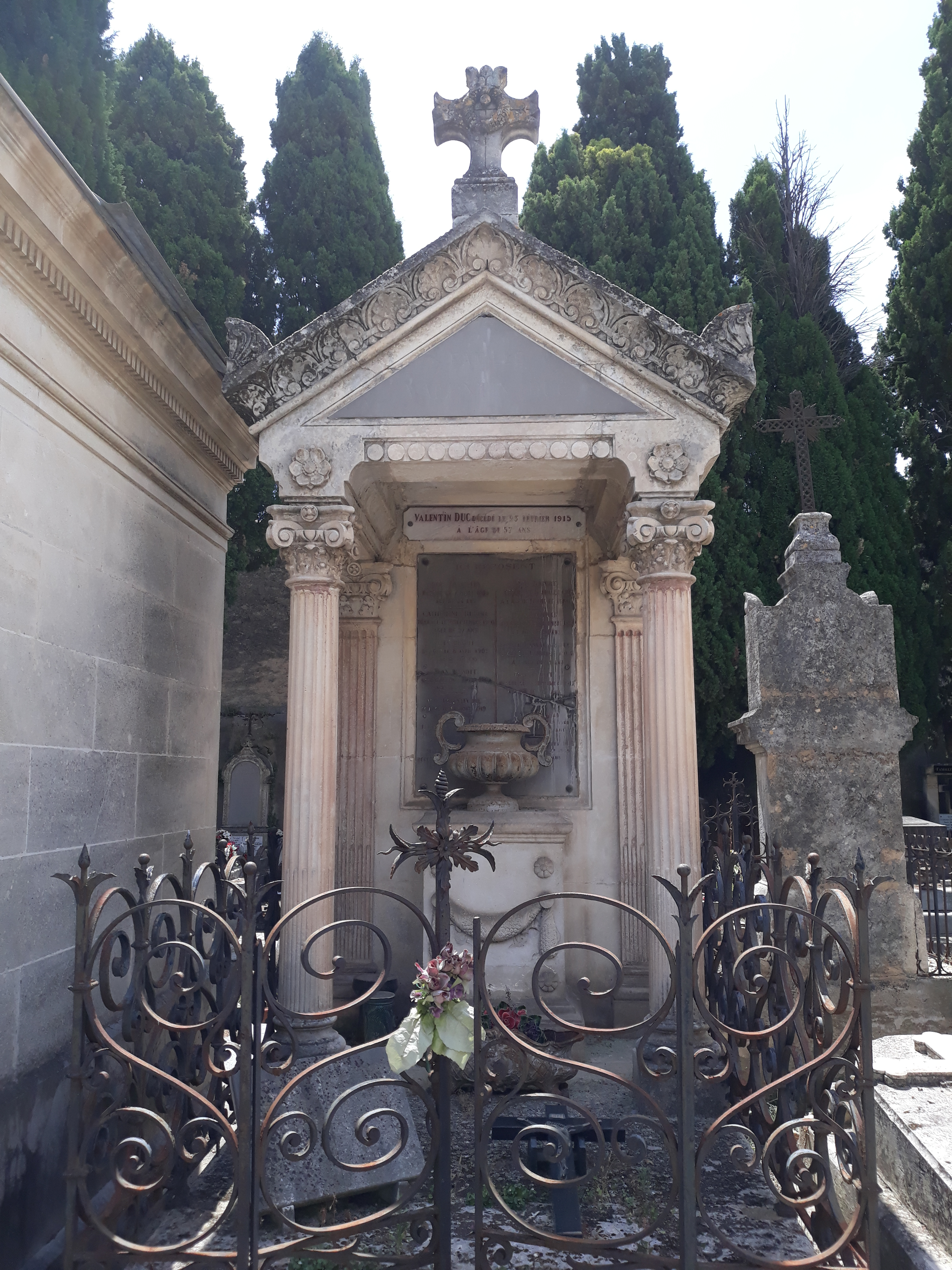 Das Grab des französischen Tenors Valentin Duc im Familiengrab auf dem Cimetière-Vieux in Béziers.